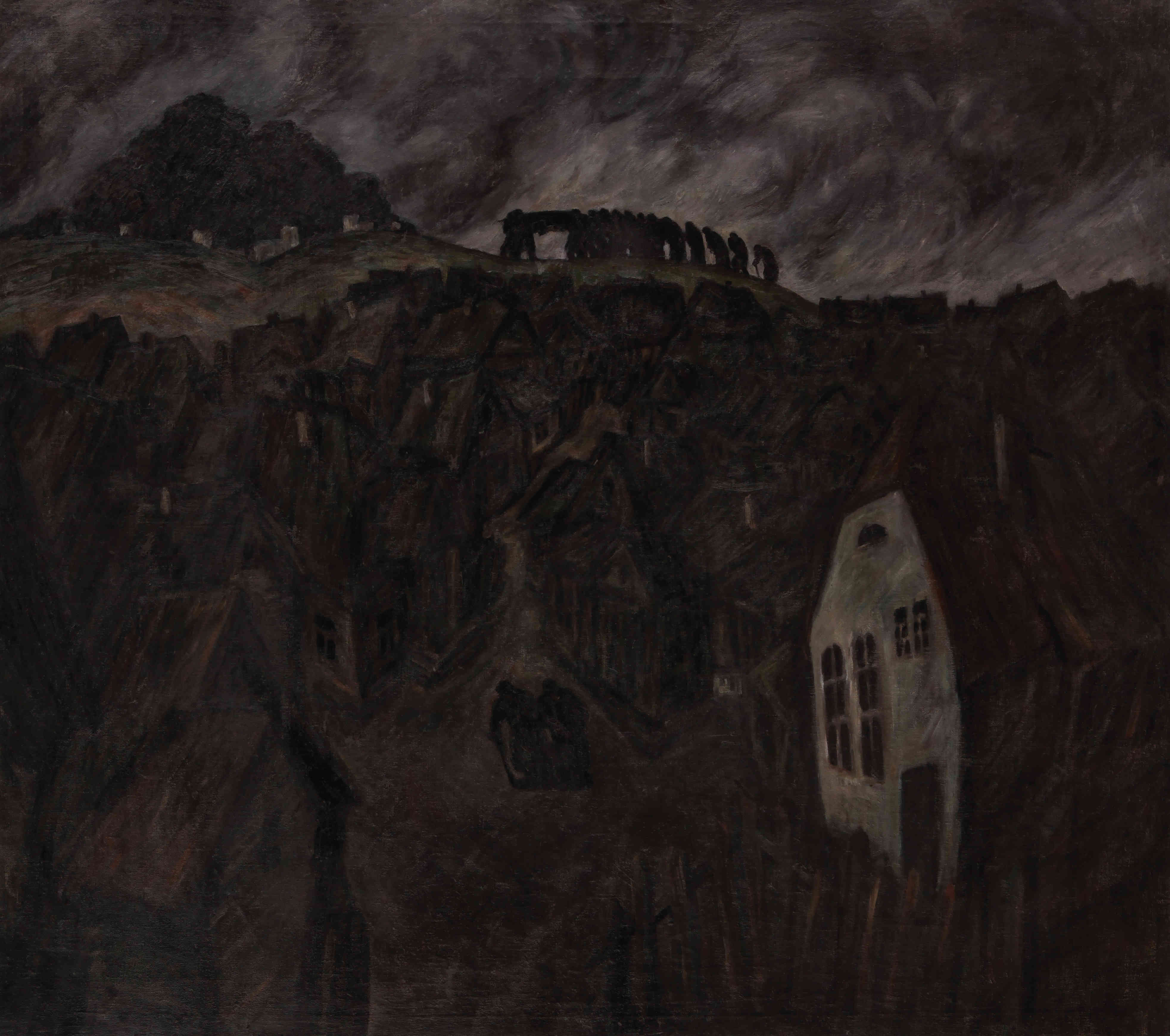 Пахаванне ў мястэчку Мільчын Ісаак, 1927 г. Нацыянальны мастацкі музей Рэспублікі Беларусь. Палатно, алей 129,2×143 см